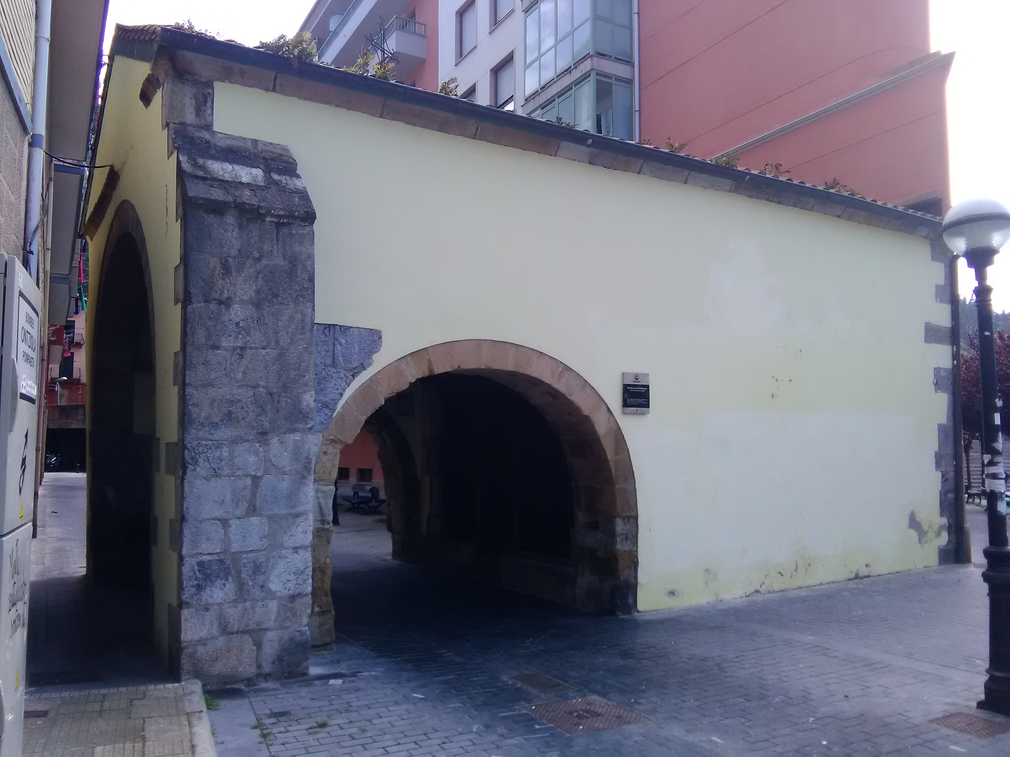 Pietatearen Aitaren kapera (Ondarroa). Beste izenez: Aita Eternoa, Atte Eternu, Aita Piedadekoa, Atte Pirere. XIV gizaldiko eraikina, aintzinan hiribilduaren sarrera nagusia izan zena Gipuzkoa aldetik.